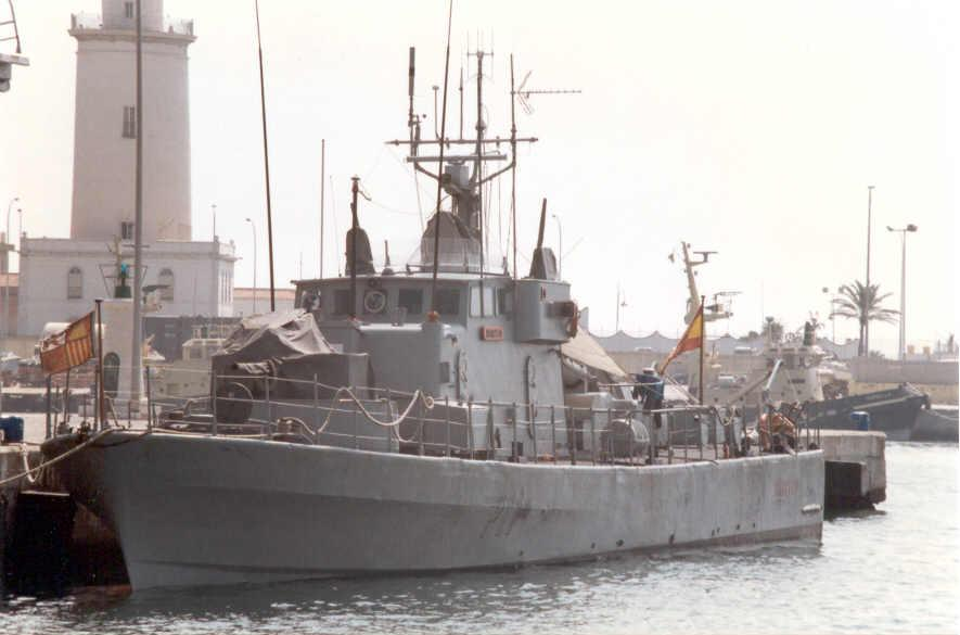 Patrullero Barceló (P-11), de la Armada Española